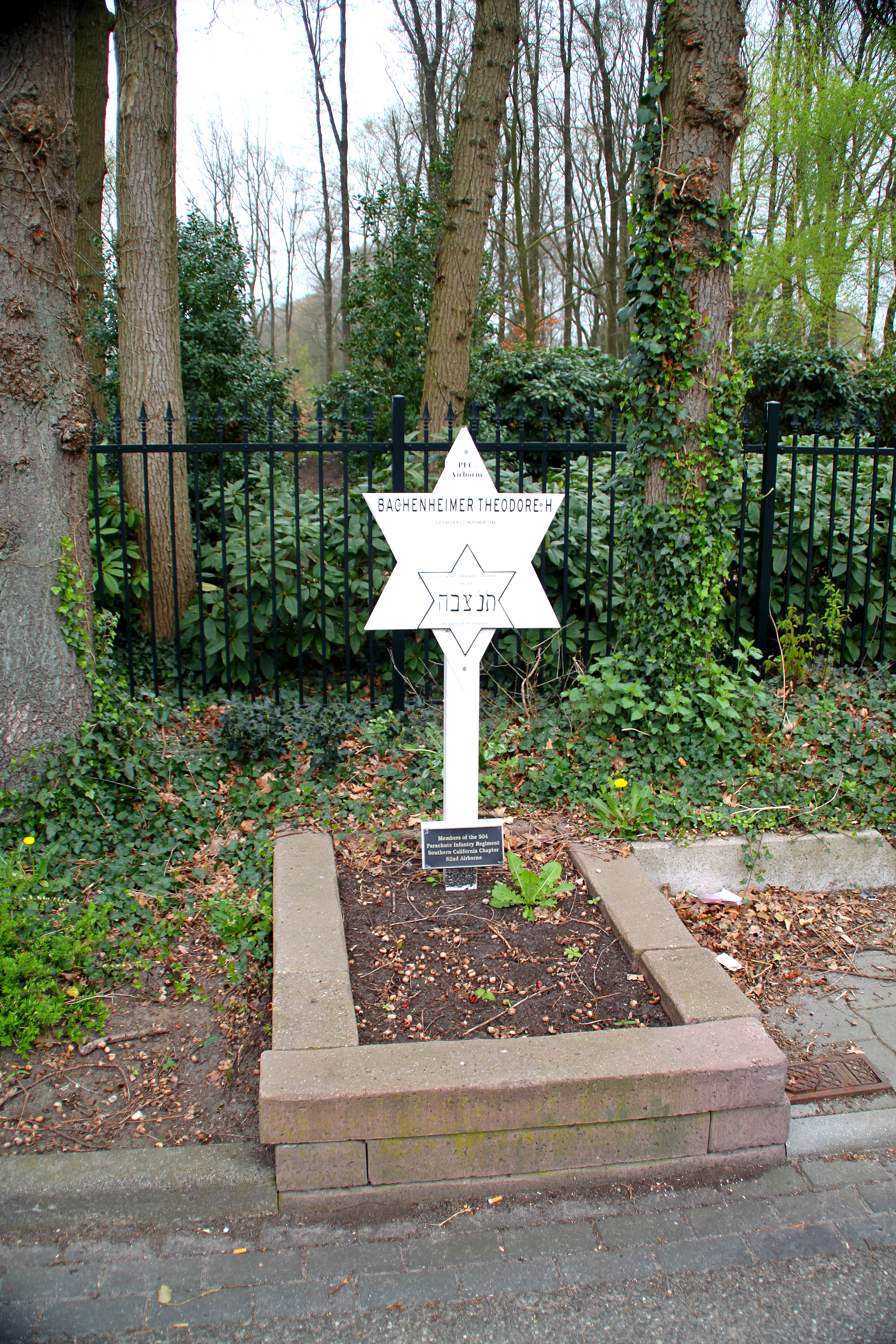 Eperweg 33, 8084HB, 't Harde NL - monument 3253 - Theodore Bachenheimer